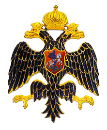 Знак Императорского Русского военно-исторического общества